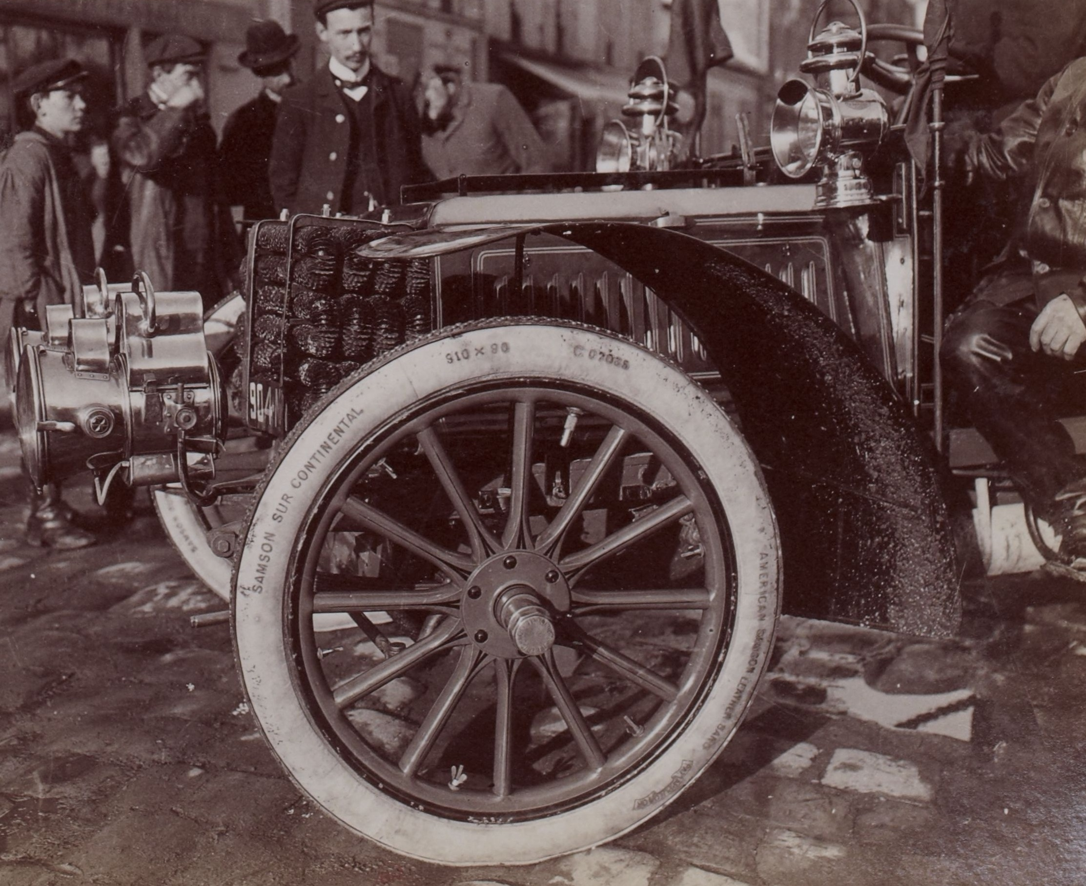 [Collection Jules Beau. Photographie sportive] : T. 29. AnnÃ©e 1905 / Jules Beau : F. 13. [Concours de la Roue, Paris - Biarritz - GÃªnes - Paris, 10 mars 1905]